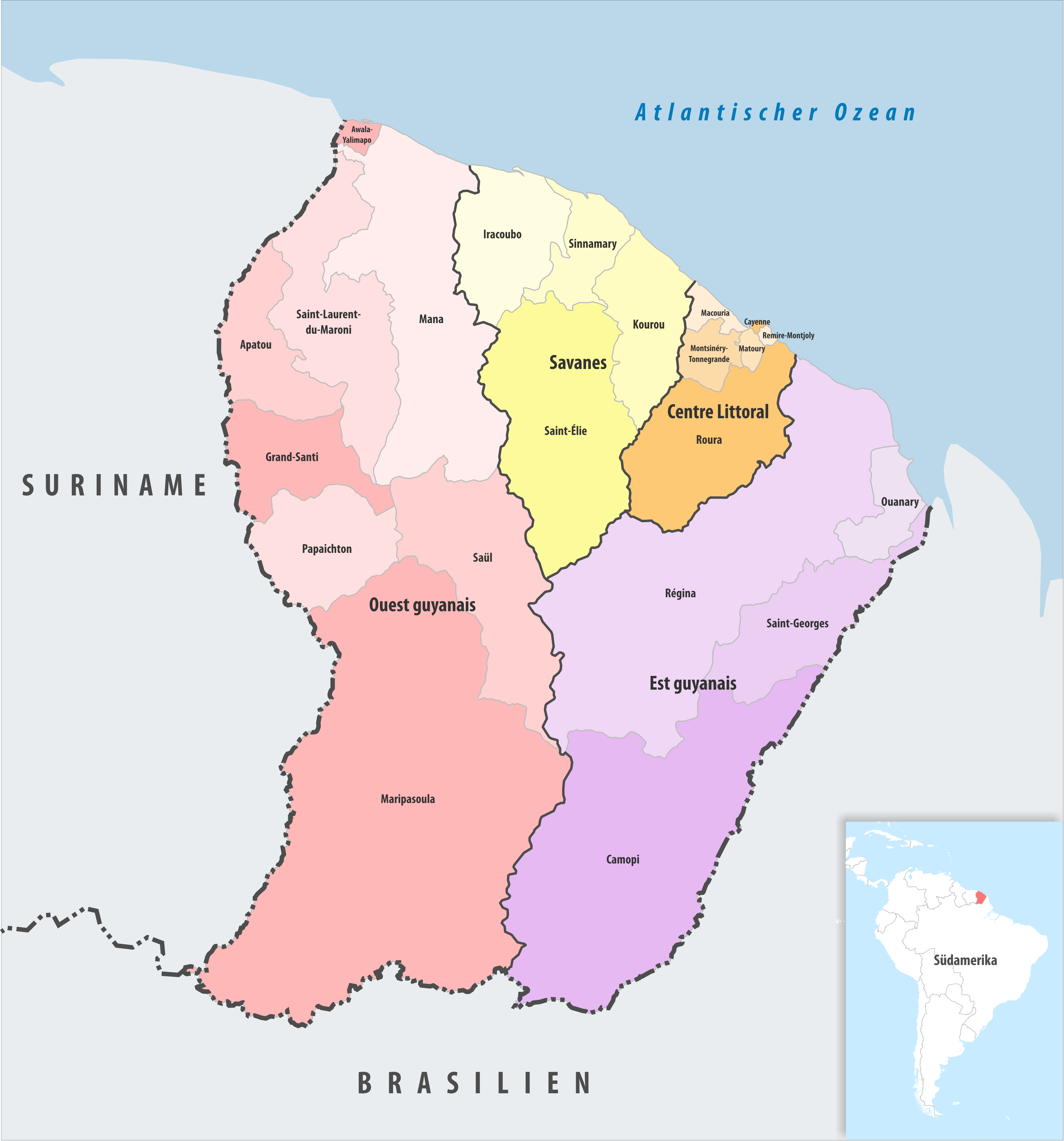 Gemeinden und Gemeindeverbände in Französisch-Guayana